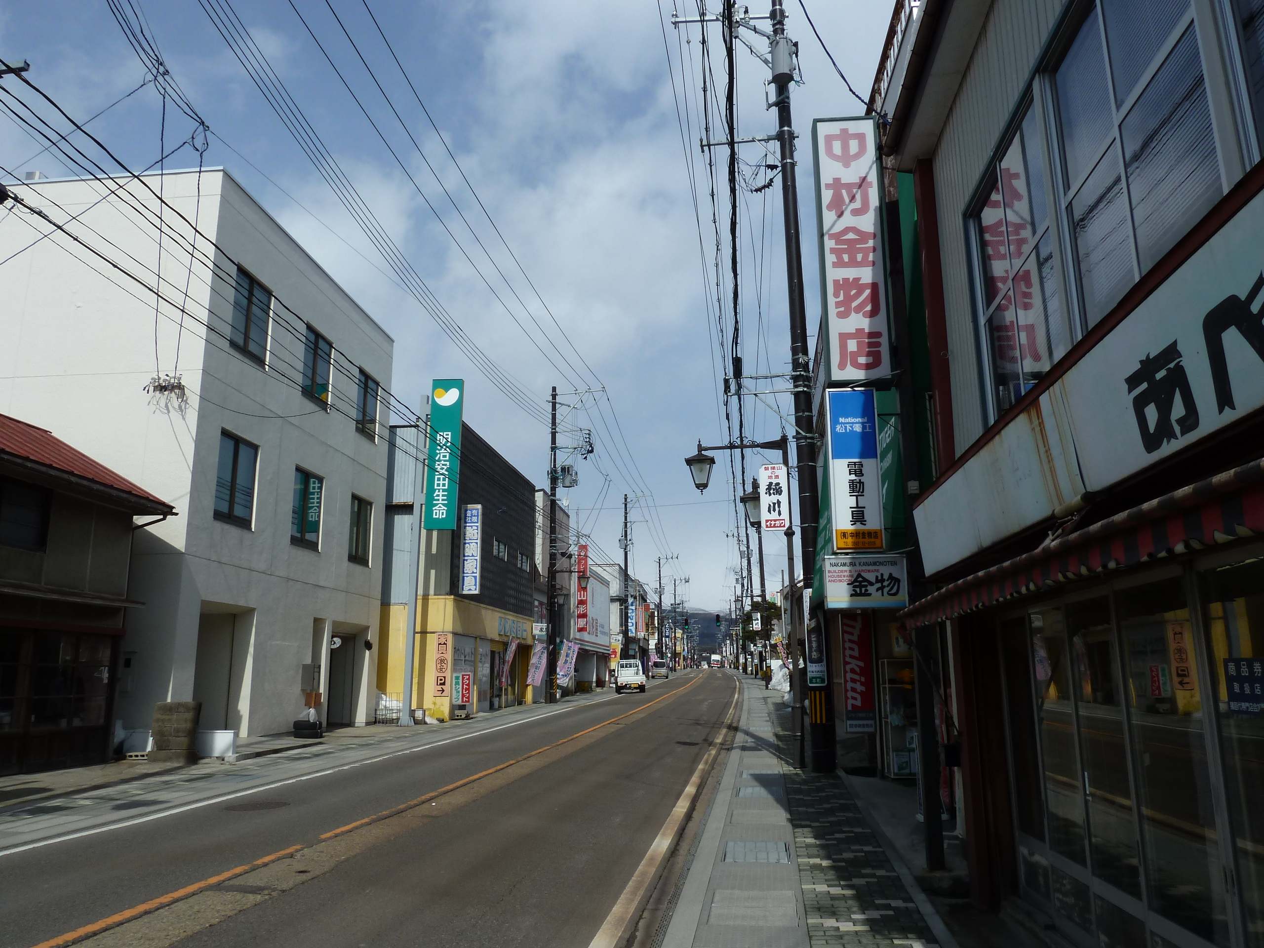 猪苗代町中心部